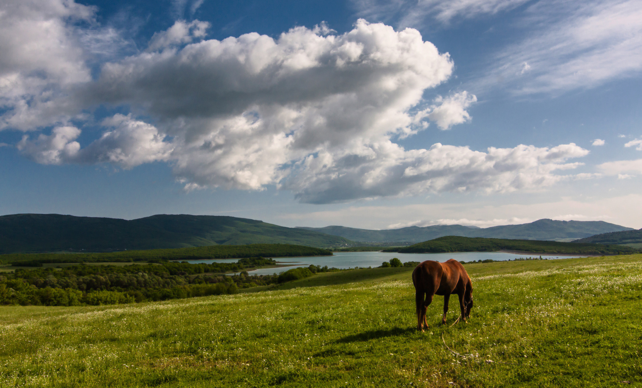 «Байдарський», Розташований на південному заході Гірського Криму. З півдня на північ територія заказнику простирається на 15 км, з заходу на схід — на 22 км. На півдні територія заказнику охоплює північний макросхил головної Кримської гряди (межі стикуються з ландшафтним заказником загальнодержавного значення «Мис Айя»), виходить до Байдарського перевалу та проходить уздовж межі Ялтинського гірсько-лісового заповідника. Північніше цієї межі Байдарський заказник охоплює практично весь водозбір Чорної річки. На заході межа заказнику простирається від території заказнику «Мис Айя» по хребтах лівобережжя долини Сухої річки до гори Гасфорта. Звідти північна межа проходить по водороздільних хребтах до перевалу Бичку. Східна межа проходить по водороздільних хребтах, що оточують правобережні притоки Чорноріченської системи, до Ай-Петринської яйли на південному сході. Чорноріченське лісництво: всі виділи в межах кварталів 1-4, 6-13, 16-36, 39-53, 55-66, 68-76, 78-81. Орлинівське лісництво: всі виділи в межах кварталів 1-6, 8, 10, 11, 14, 19, 24, 25, 27-62. Тернівське лісництво: всі виділи в межах кварталів 34, 36, 38, 39-41,43